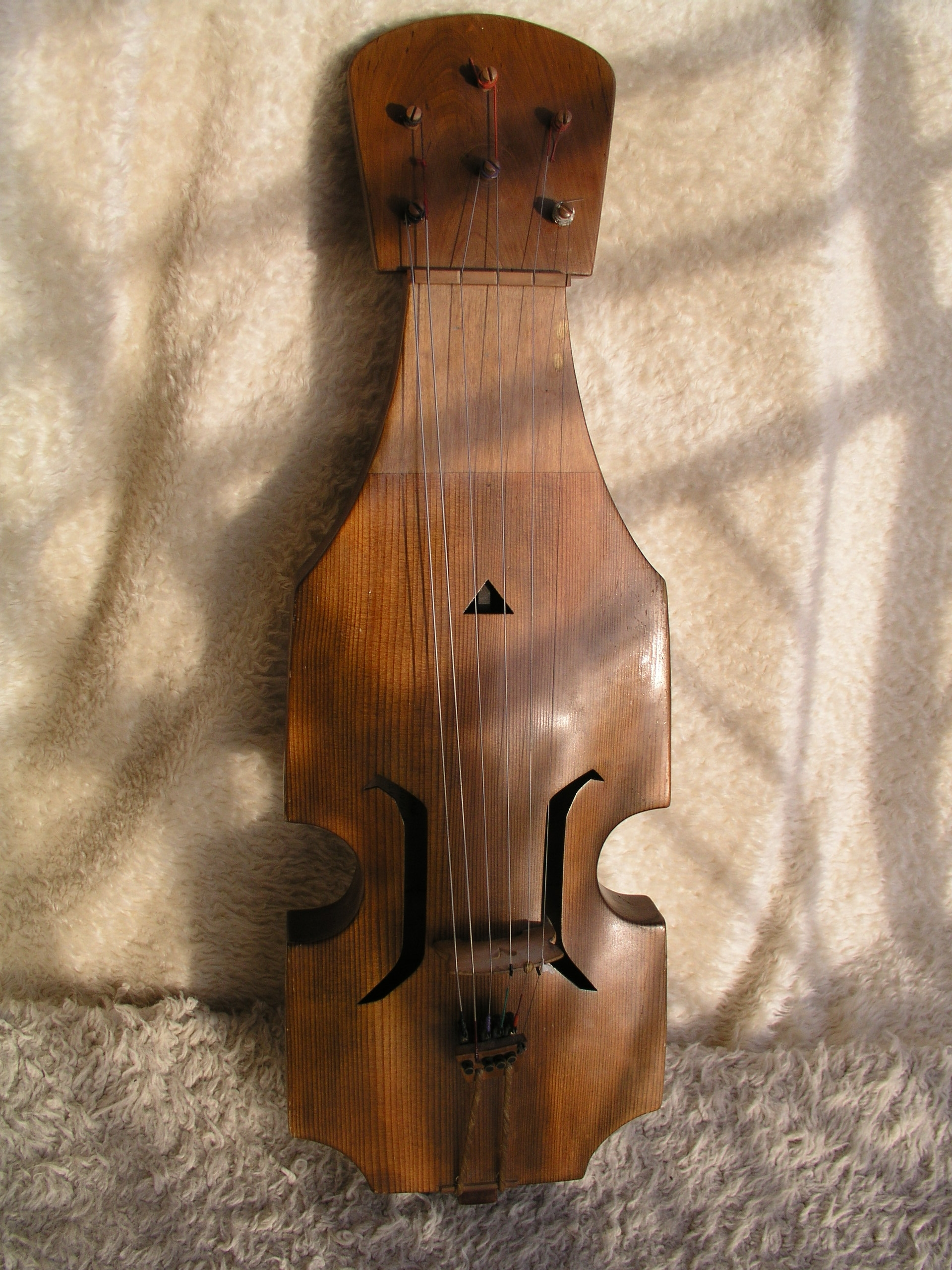 Fidel Płocka